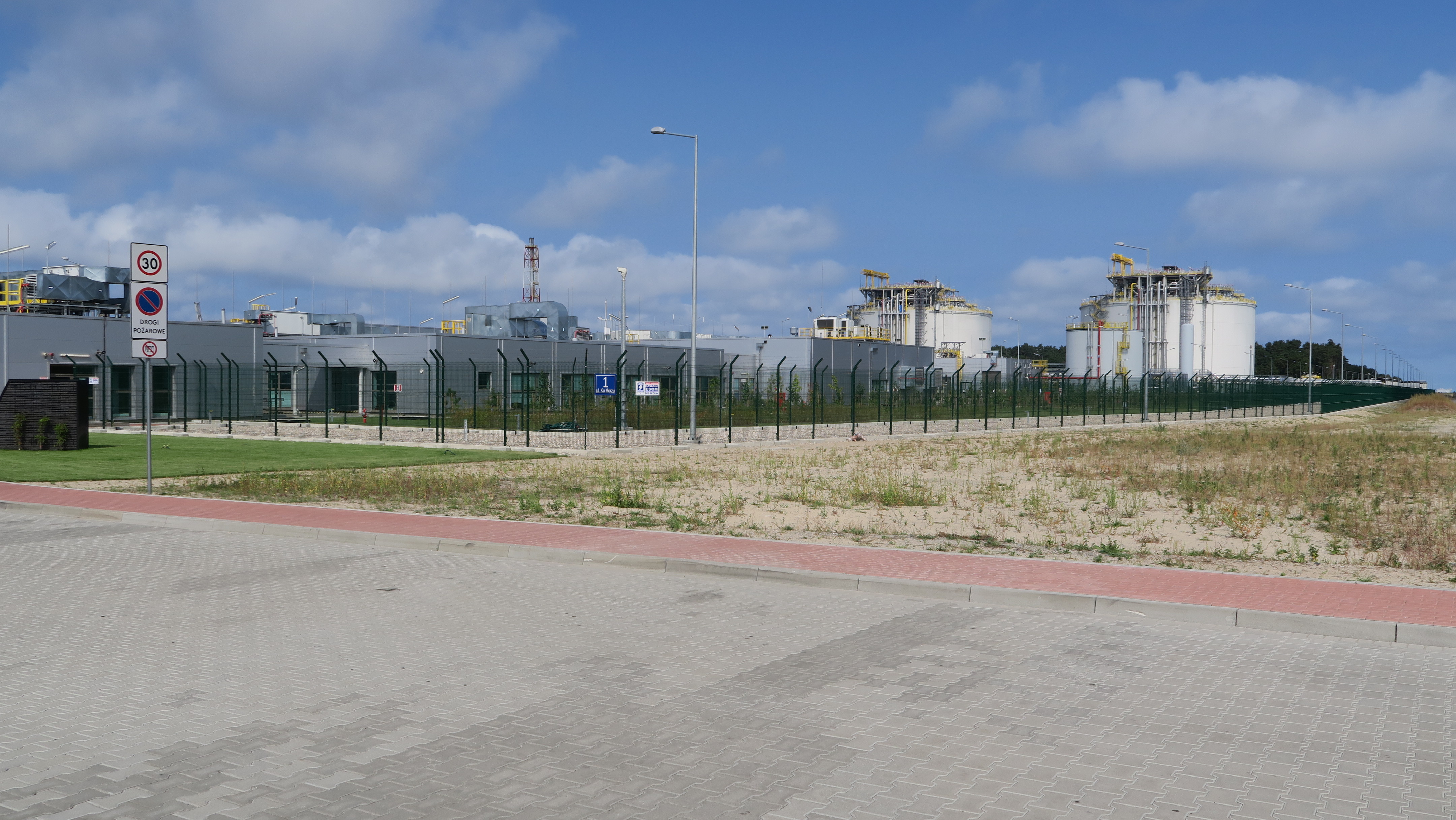 Terminal LNG Świnoujście - widok ogólny